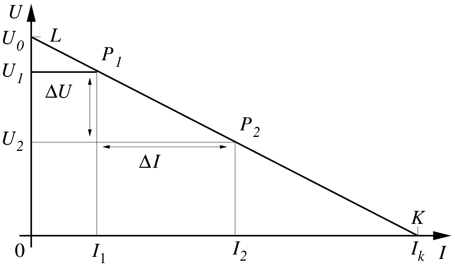 Kennlinie zur Klemmspannung